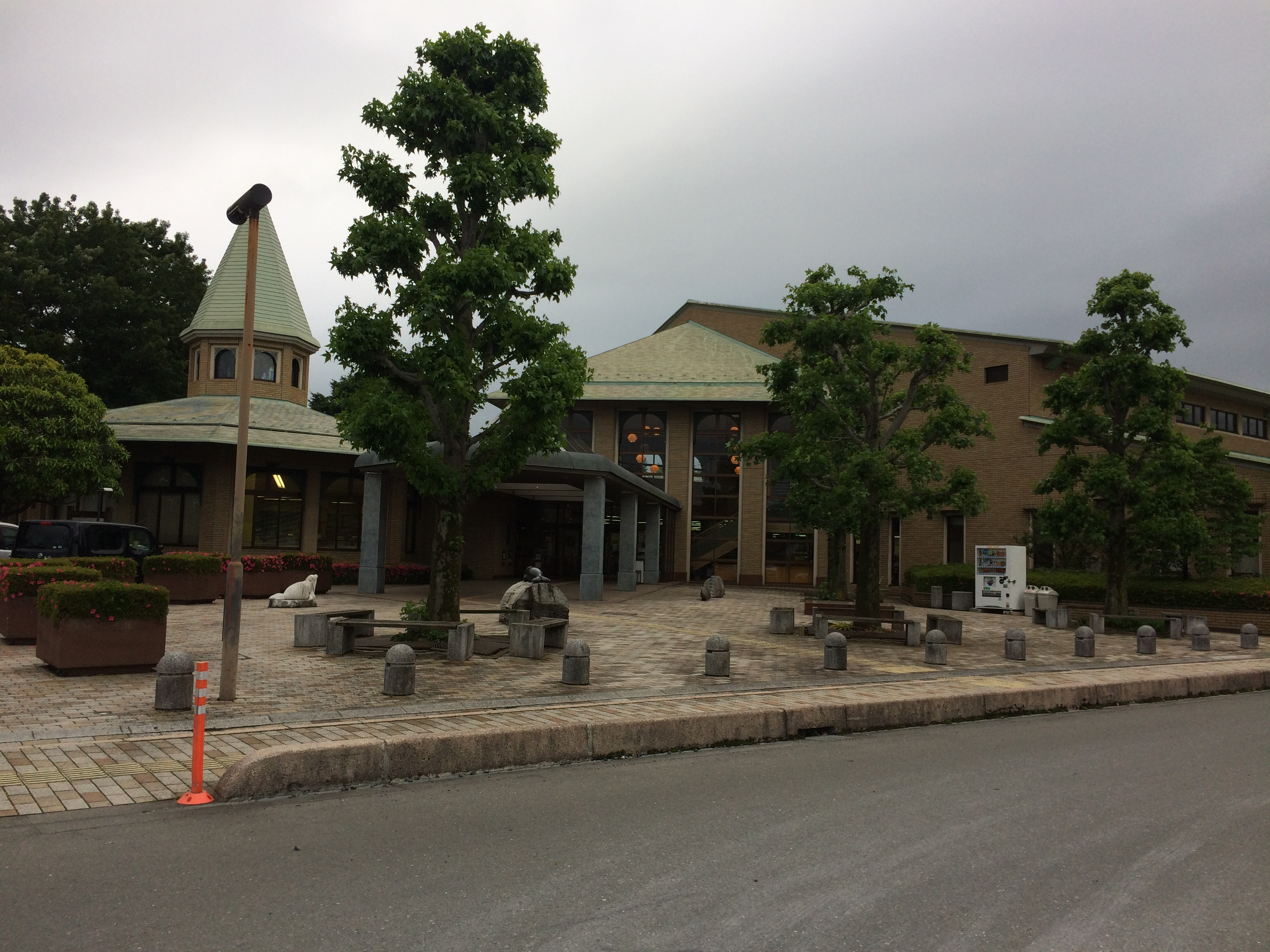 鶴ヶ島市立中央図書館全景